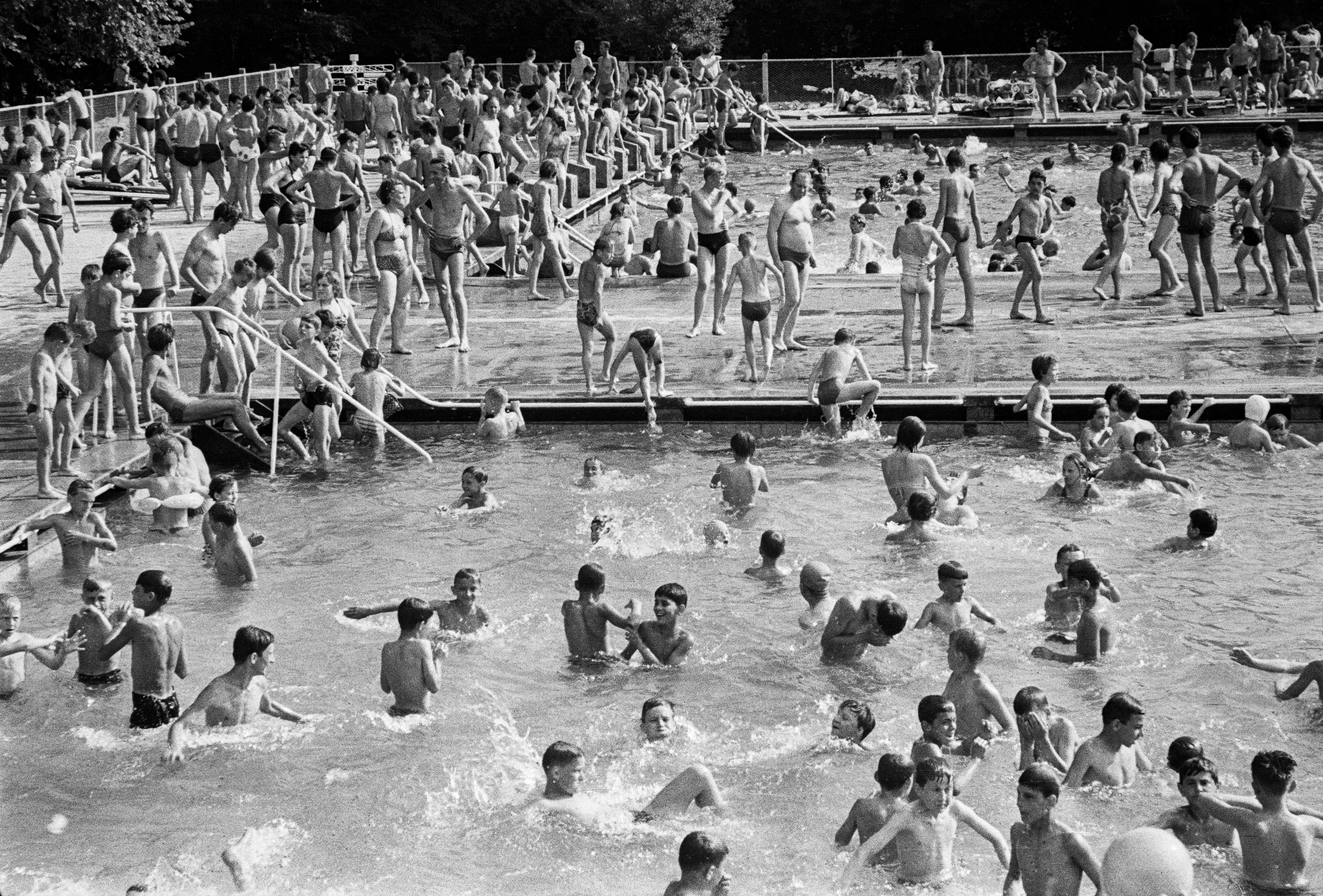 Kopališče na Mariborskem otoku.